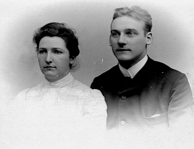 Gerard Brom en Willemien Struick, foto door Anton Cornelis Thomann (1873/1874-1946)